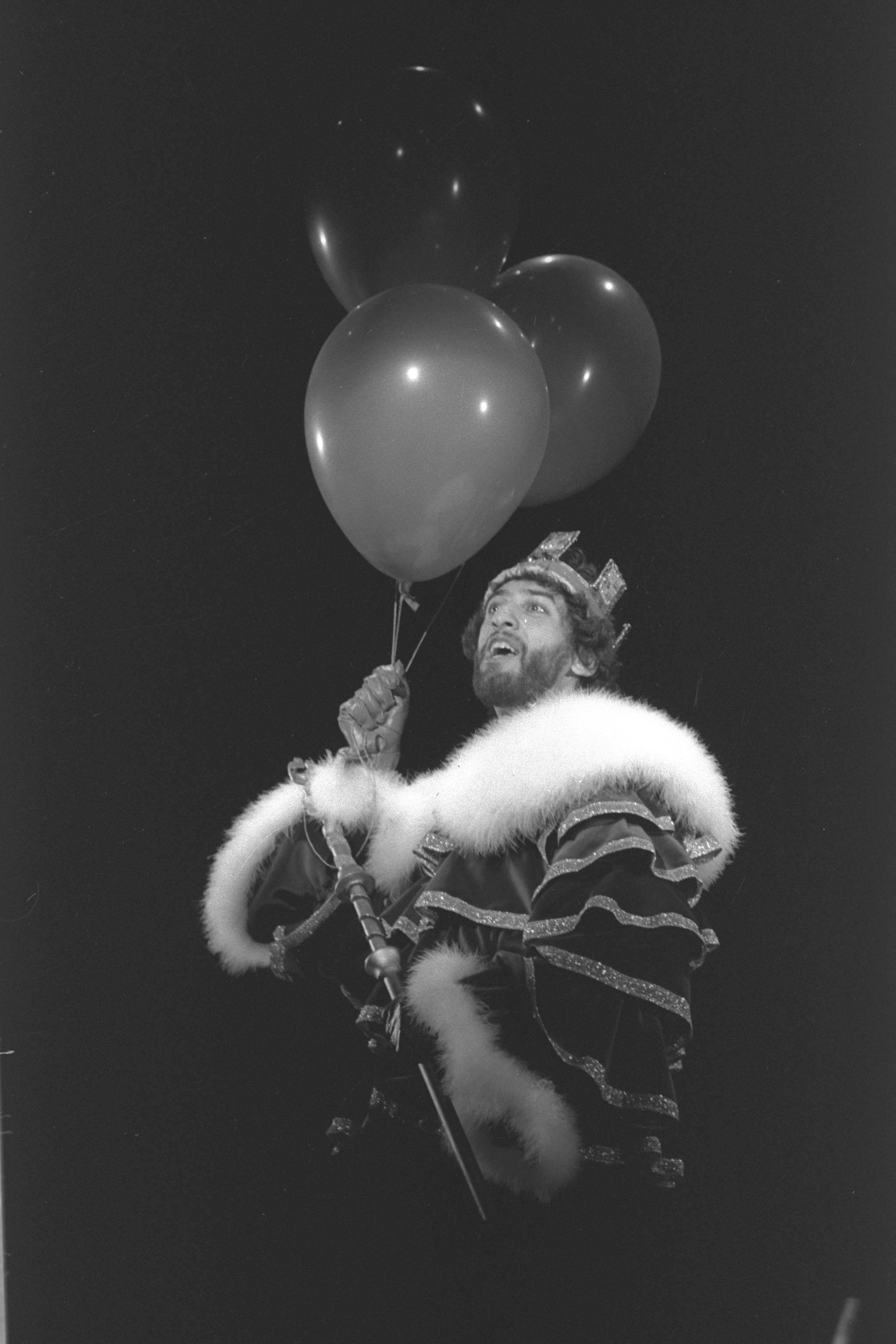 MOSHE BECKER IN NISSIM ALONI'S - THE AMERICAN PRINCESS - AT THE HABIMA THEATRE IN TEL AVIV. משה בקר במחזה של ניסים אלוני - הנסיכה האמריקאית - בתאטרון הבימה בתל אביב Photo: Yaakov Saar (1951–) Alternative names SA'AR YA'ACOV; Jacob Saar; Saʻar, YaʻaḳovDescriptionIsraeli photographerDate of birth 1951 Authority control : Q28751896 VIAF: 298161188 NLI: 001394176 creator QS:P170,Q28751896 , 01/18/1982